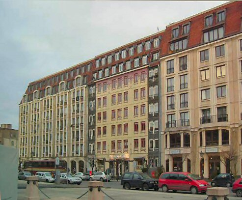 Beschreibung: Plattenbauten am Gendarmenmarkt, Berlin Quelle: fotografiert im Maerz 2004 Fotograf: Okapi Lizenzstatus: GFDL/Wikipedia